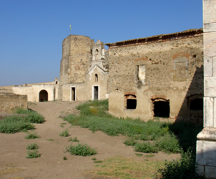 Fortaleza da Juromenha - vista interior da entrada e ruínas